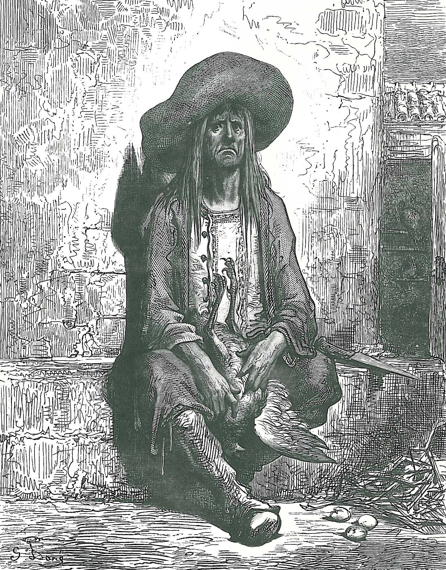 illustration for Jean de La Fontaine's fables by Gustave Doré